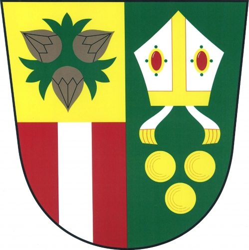 Znak, Lísek, okres Žďár nad Sázavou: Polcený štít, vpravo zlato-červeně dělený, nahoře trojlist (2, 1) se třemi lískovými oříšky přirozené barvy, dole stříbrný kůl. V levém zeleném poli stříbrná, zlatem a drahými kameny zdobená mitra se stříbrnými fimbriemi se zlatým třepením nad třemi (2, 1) zlatými koulemi.